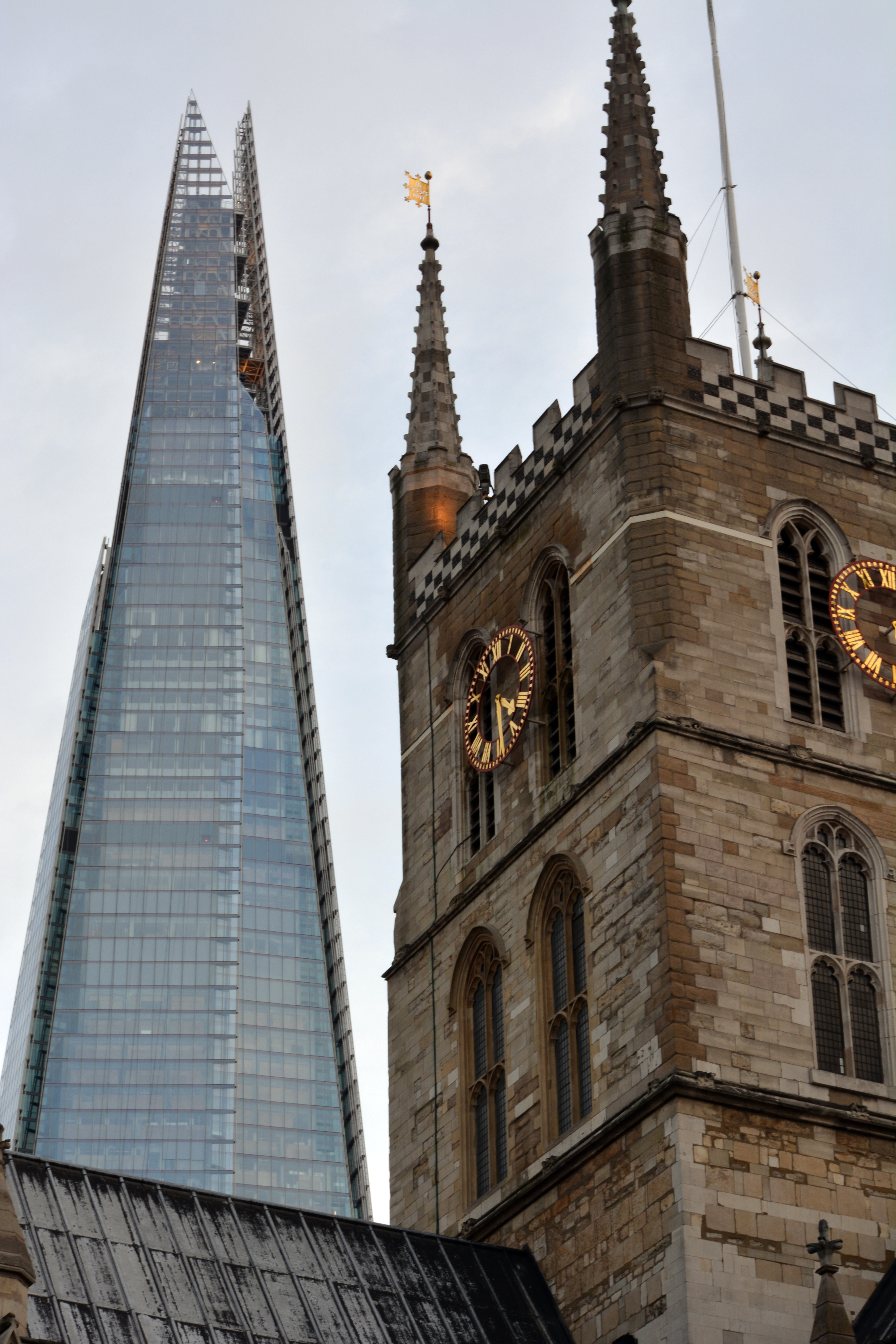 London